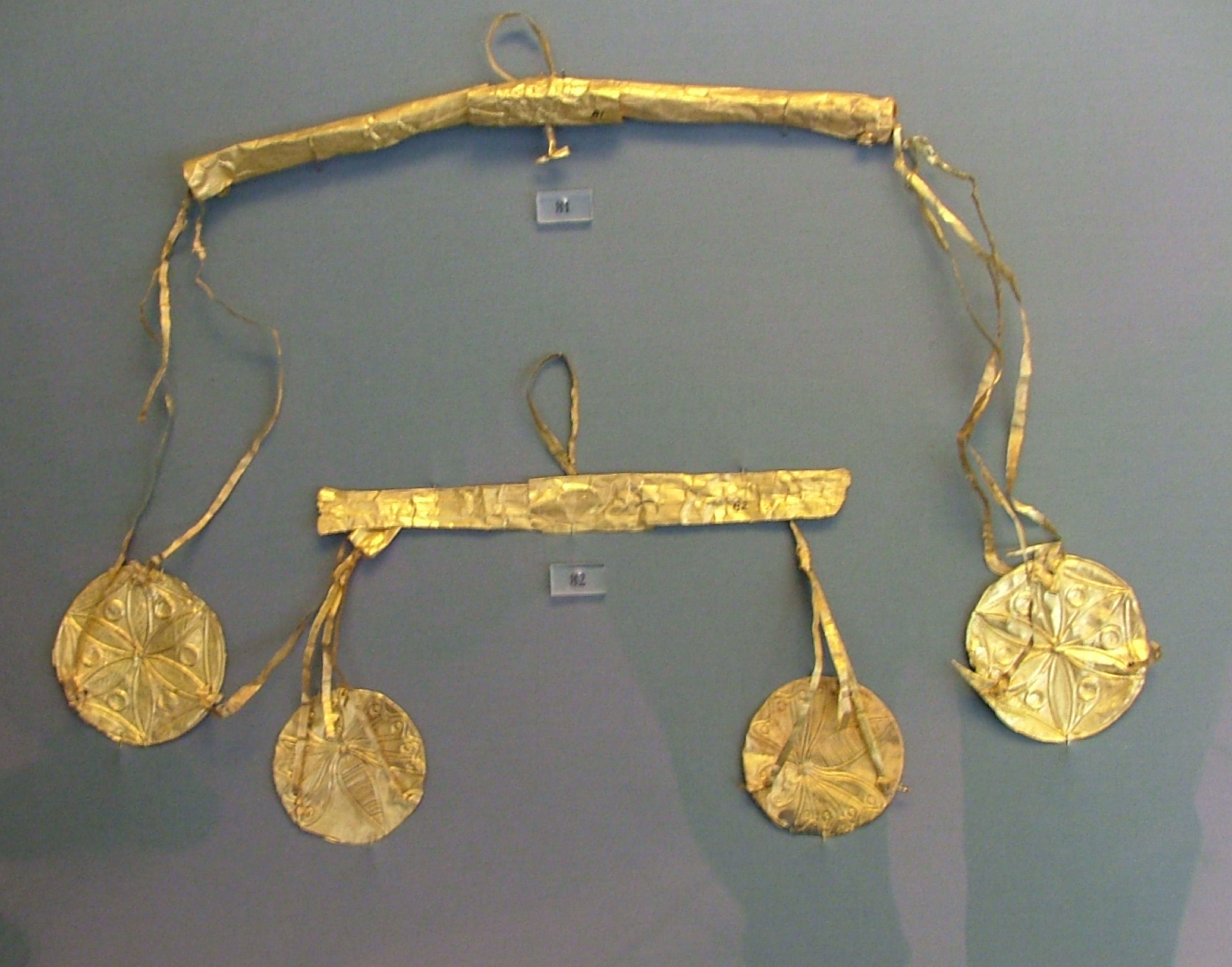 Balanzas de oro, que se cree que simbolizaban el peso del alma en el inframundo. En los discos está representada una mariposa (símbolo del alma). Halladas en las tumbas III, IV y V del Círculo de Tumbas A de Micenas. siglo XVI a. C. (Museo Arqueológico Nacional de Atenas).